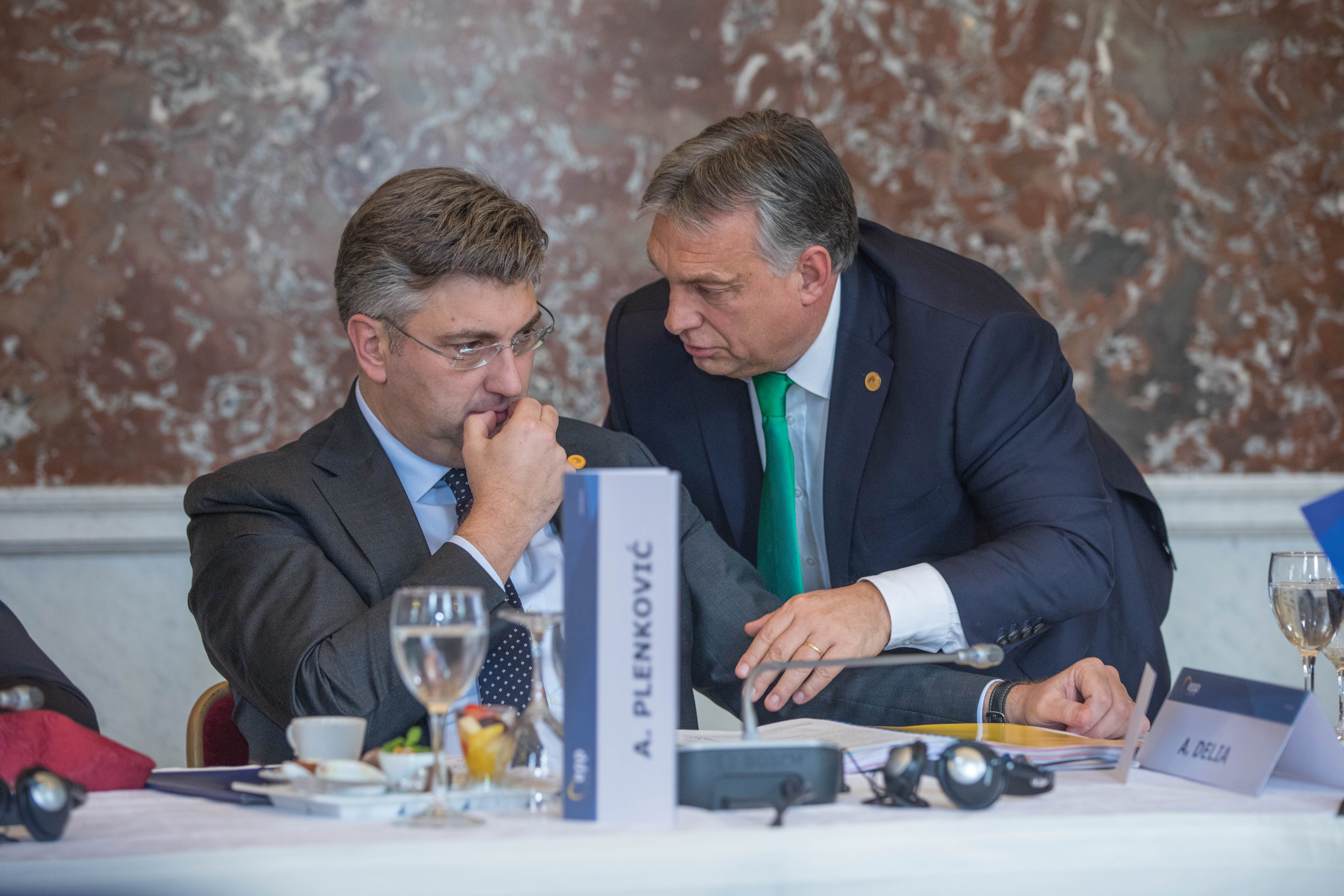 EPP Summit, 14 December 2017